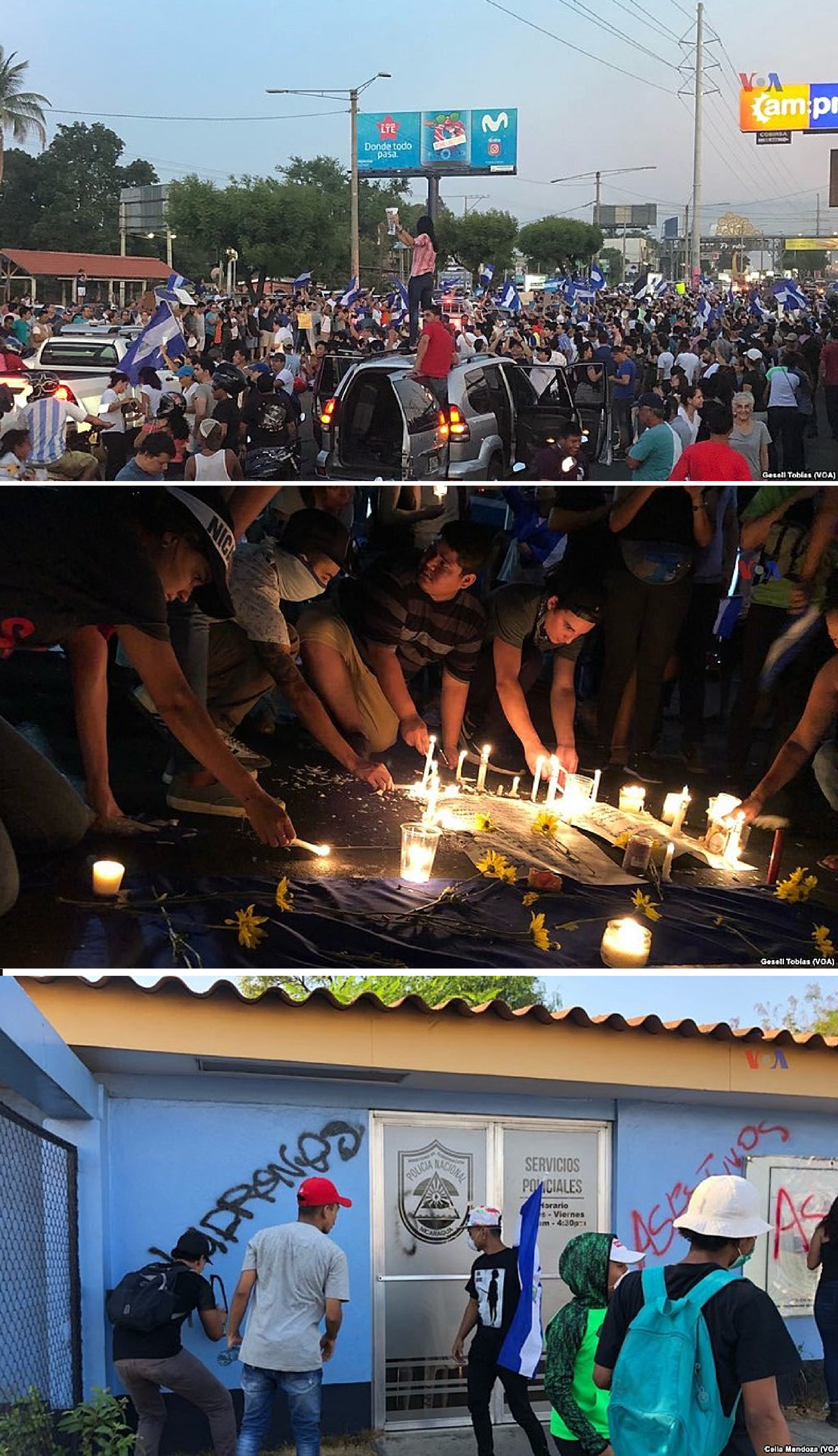 Protestas en Nicaragua de 2018